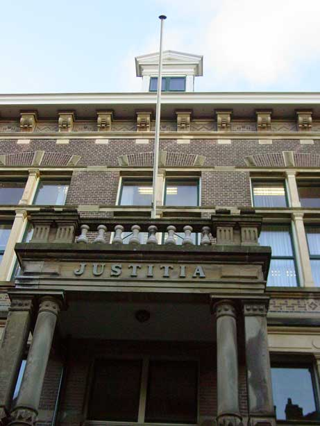 eigen werk, vrijgegeven voor openbaar gebruik. Het voormalige gerechtsgebouw in Haarlem aan de Janstraat, tegenwoordig (vanaf 2006) is de rechtbank gevestigd in een nieuwbouwcomplex aan het Simon de Vrieshof.